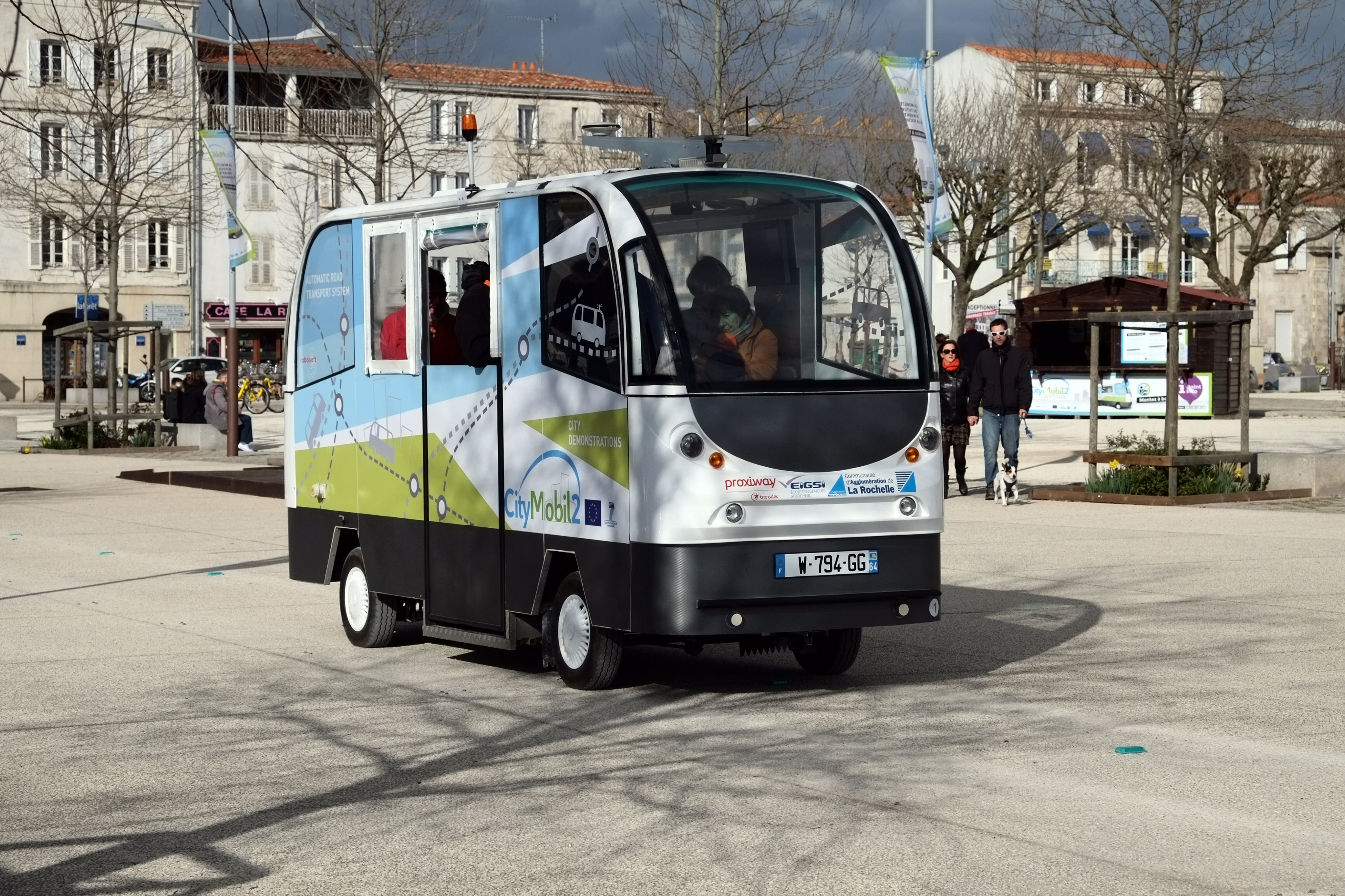 CityMobil2 véhicule expérimental sans chauffeur en situation de test place du Cdt de la Motte Rouge à La Rochelle Charente-Maritime France